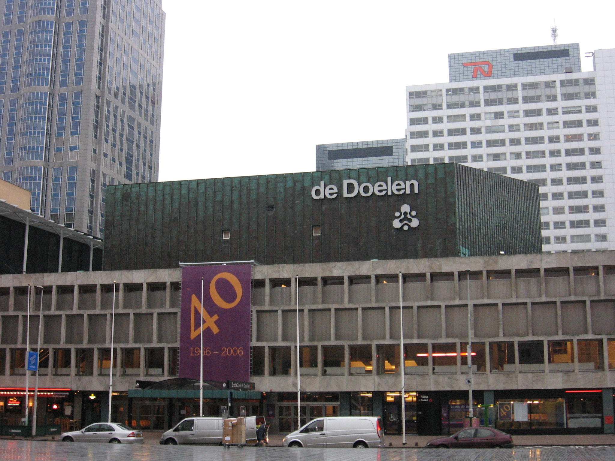 de Doelen, Rotterdam, dec 2006